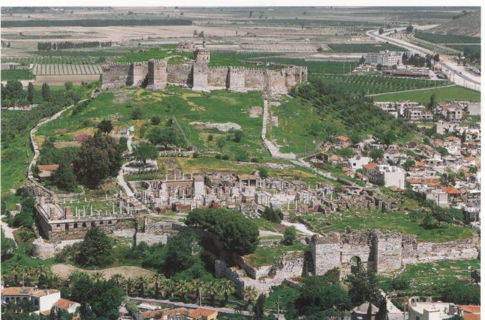 İzmir'in Selçuk ilçesindeki St.John Kilisesi ve arkasında Selçuk(Ayasuluk) Kalesi